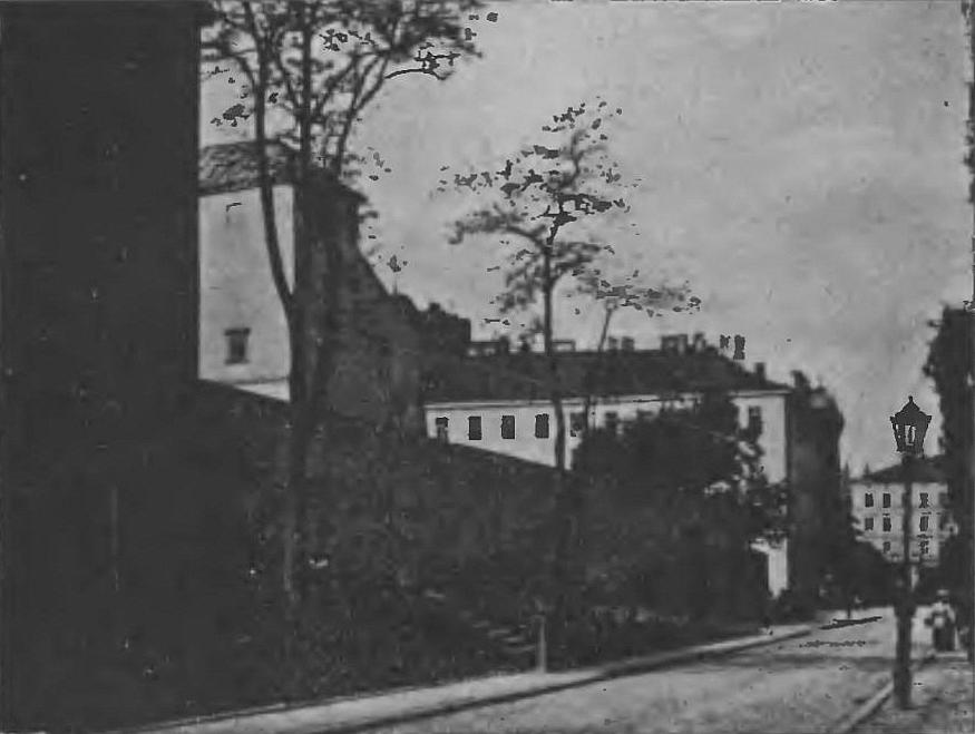 Zabudowania bernardyńskie we Lwowie, wykorzystywane przez C. K. Gimnazjum we Lwowie. Widok od ulicy Wałowej.